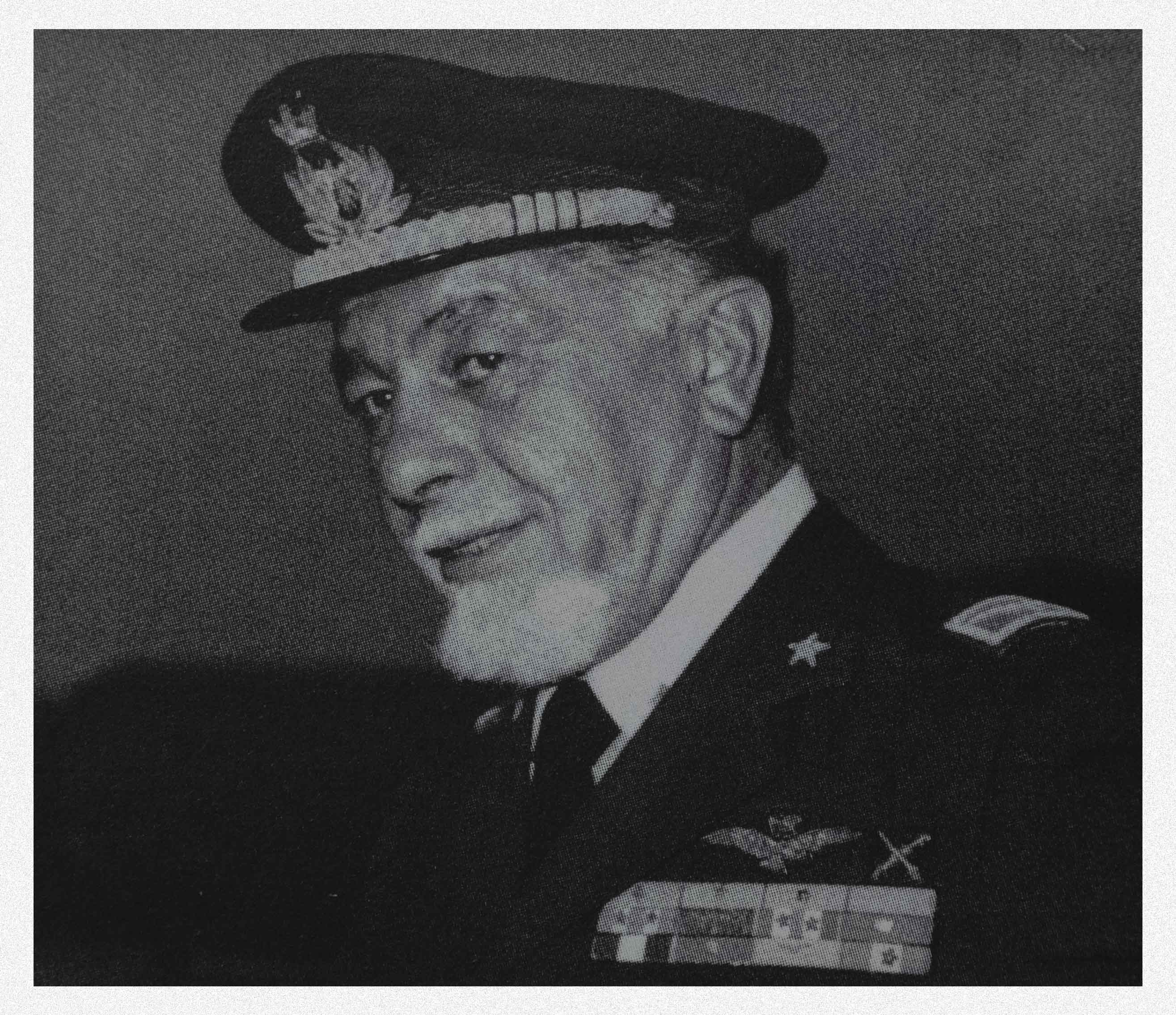 Errico Marescalchi